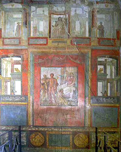 fresco in the Casa dei Vettii, Pompeii